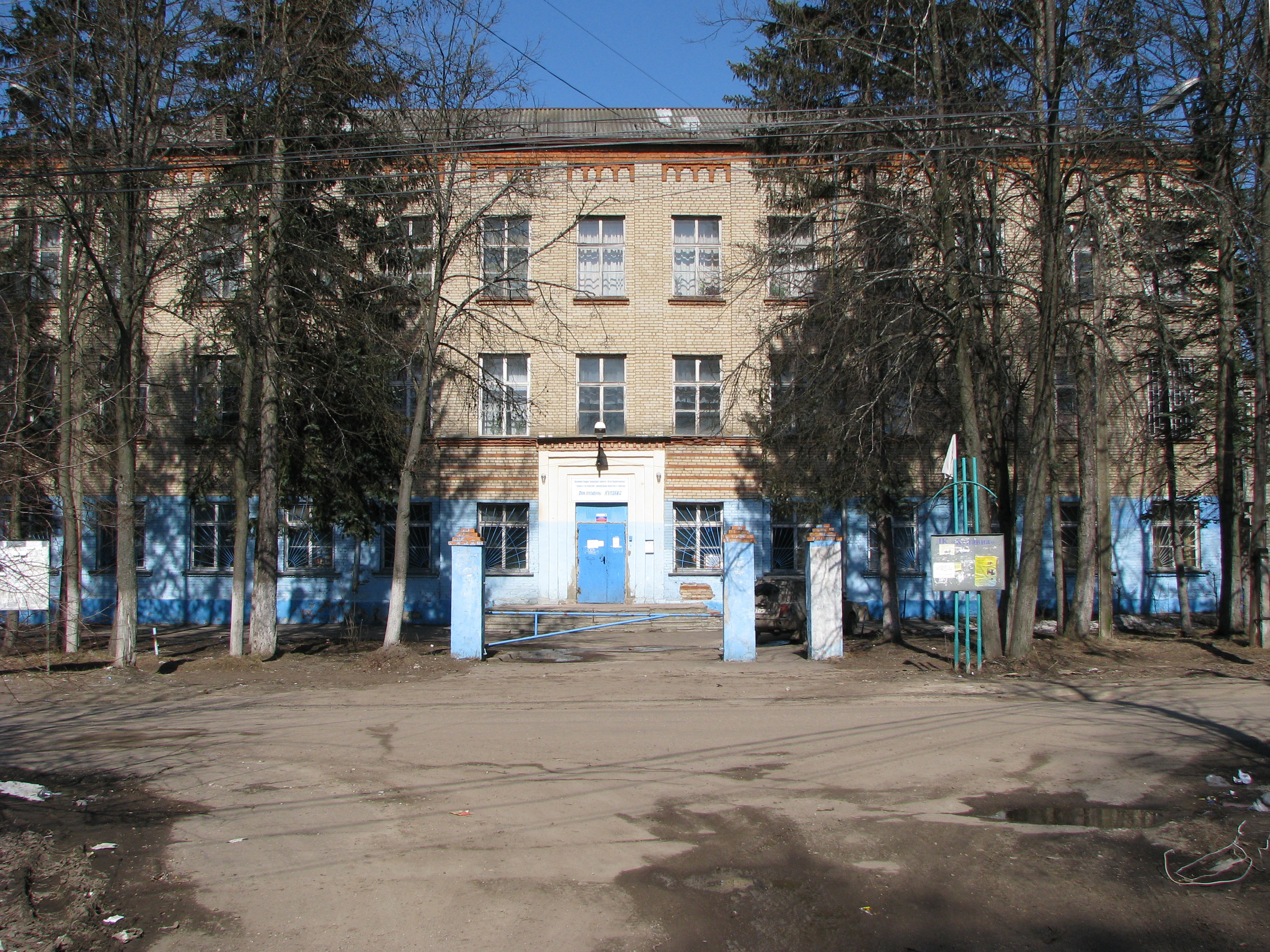 Клуб в микр. Купавна г. Железнодорожного. 03.04.2010.